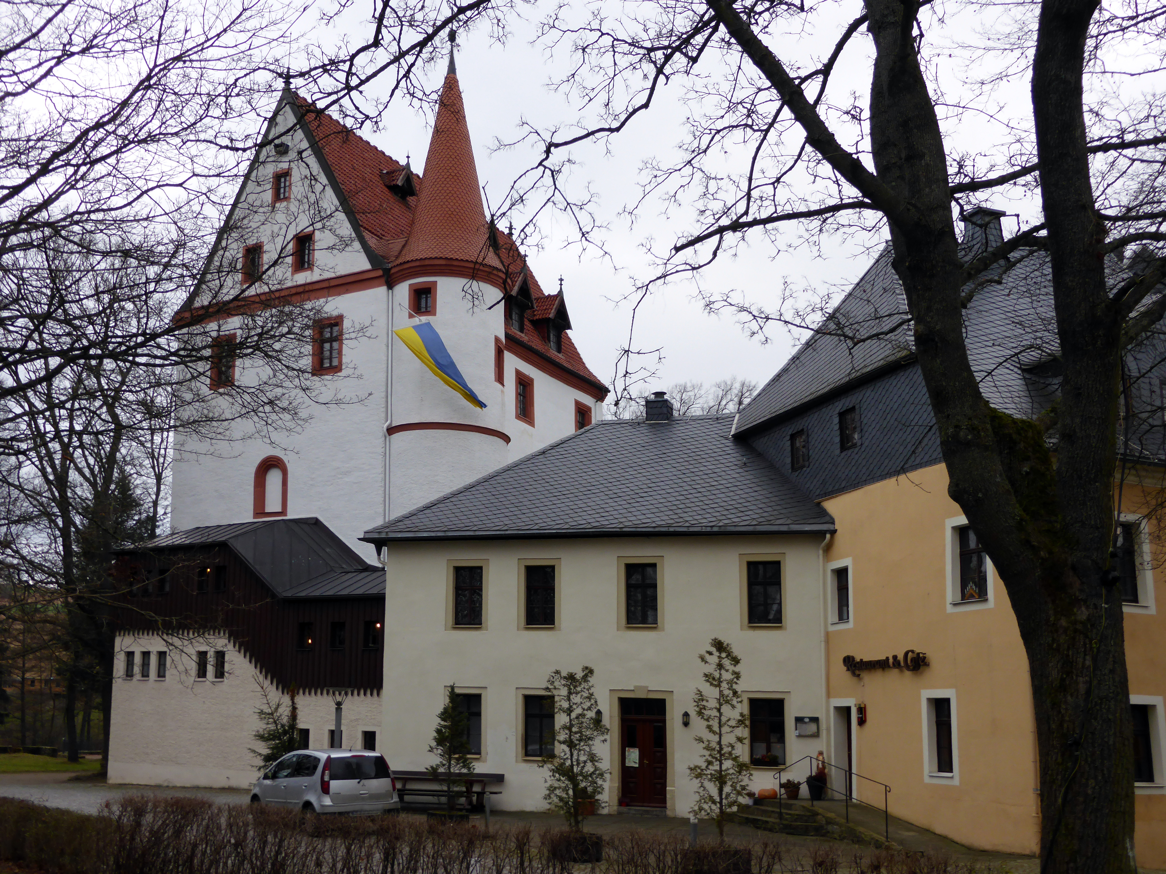 Schloss Schlettau - Schlettau, Erzgebirgskreis - Sachsen.